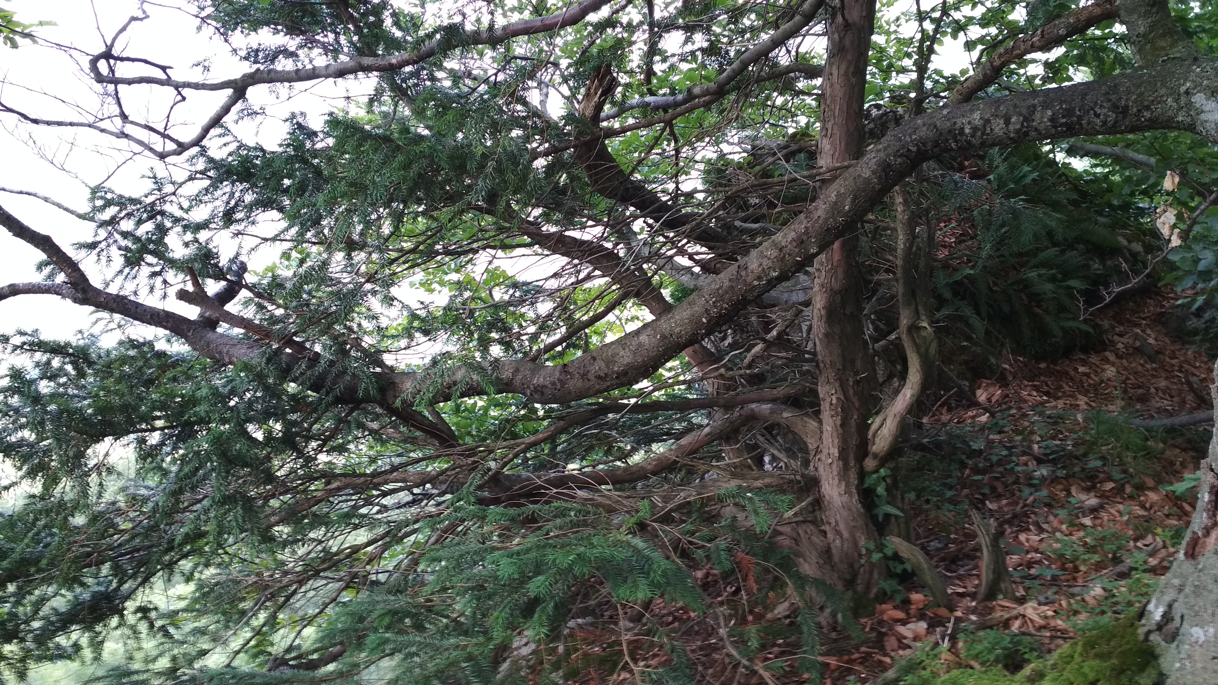 На скелі Чурь біля с. Мала Уголька